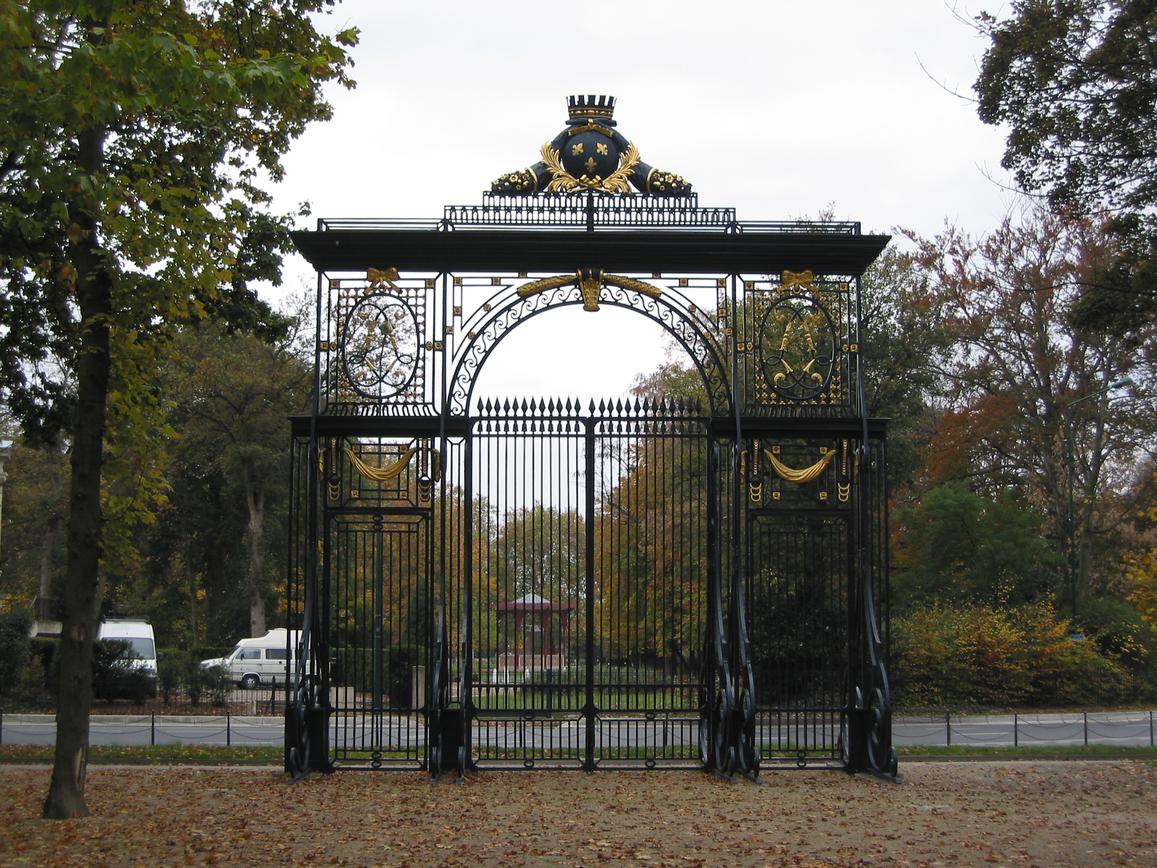 Paris door, Reims, France